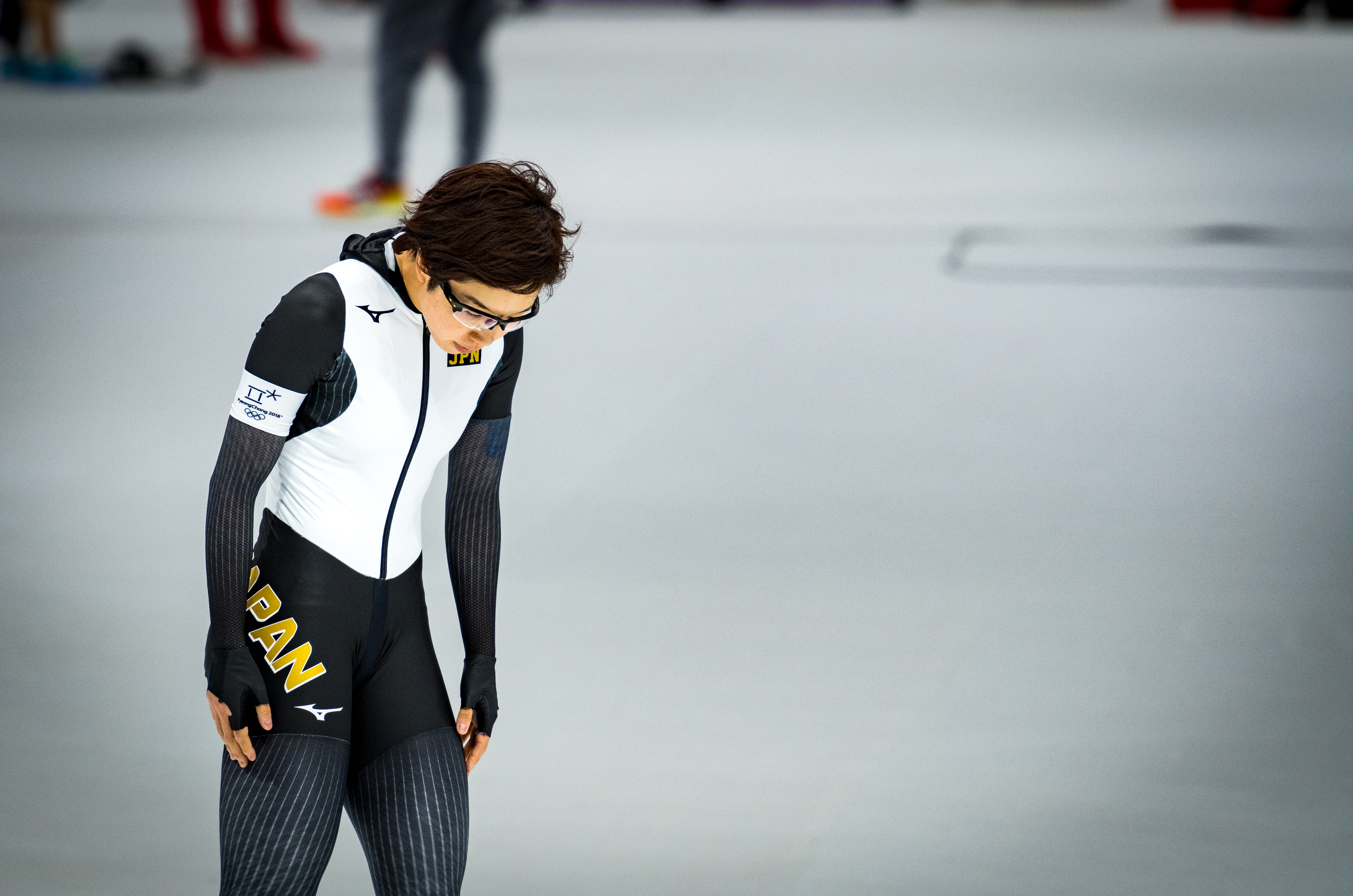 _DSC5302